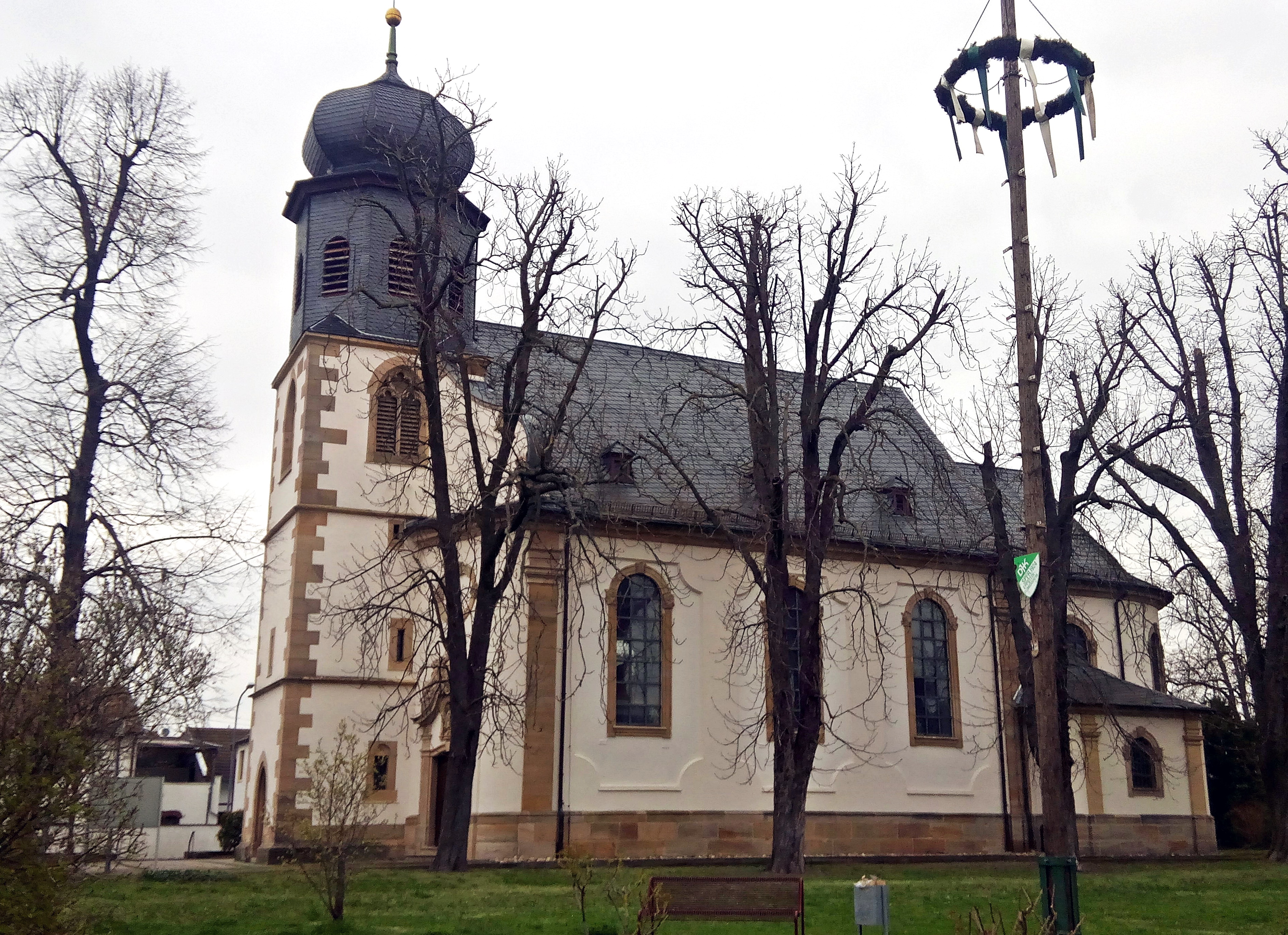 Eppstein St. Cyriakuskirche